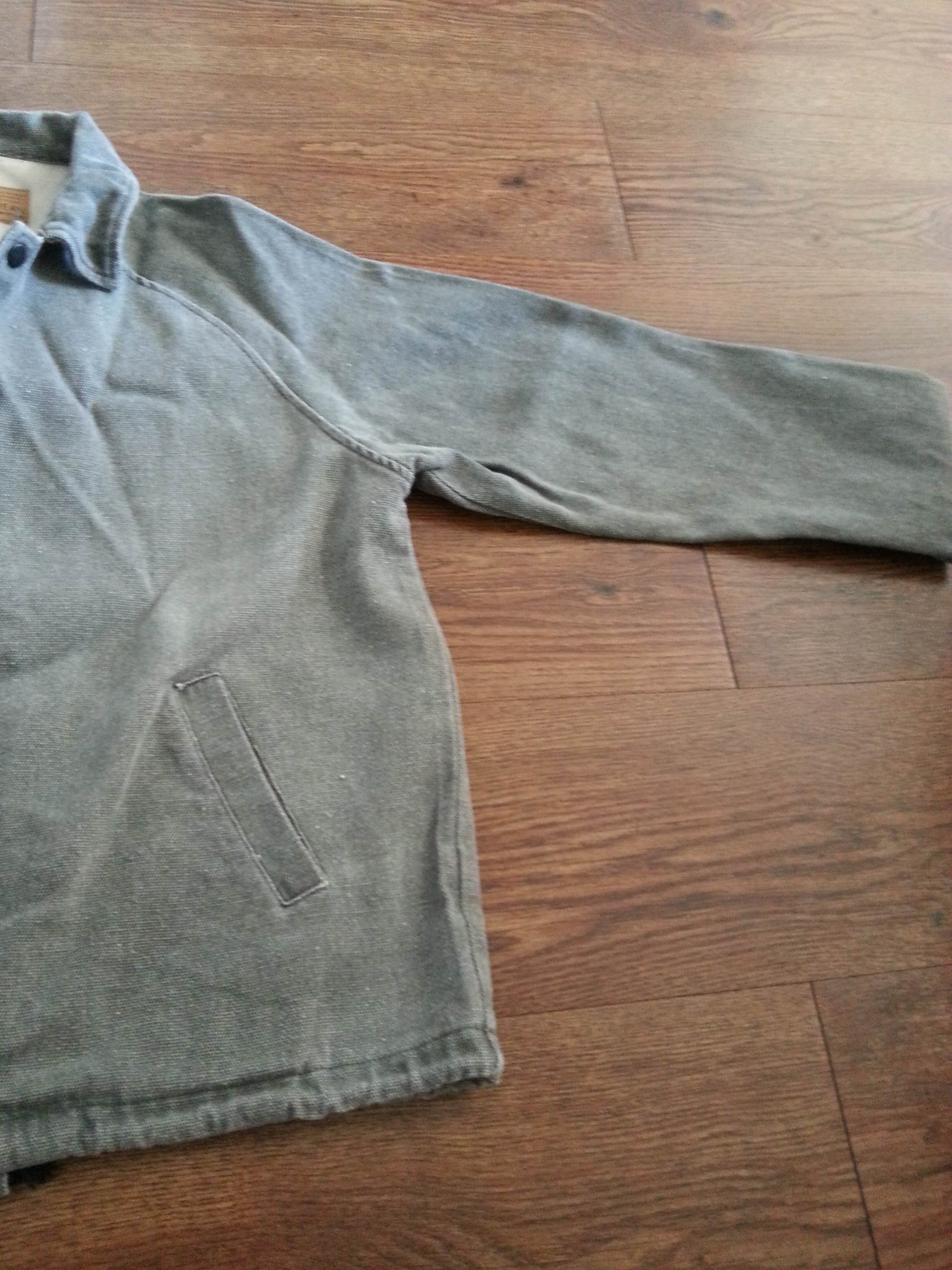 회색 코치 자켓